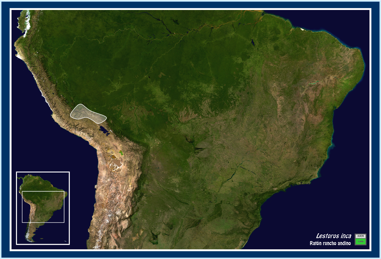 Mapa del área de distribución de Lestoros inca